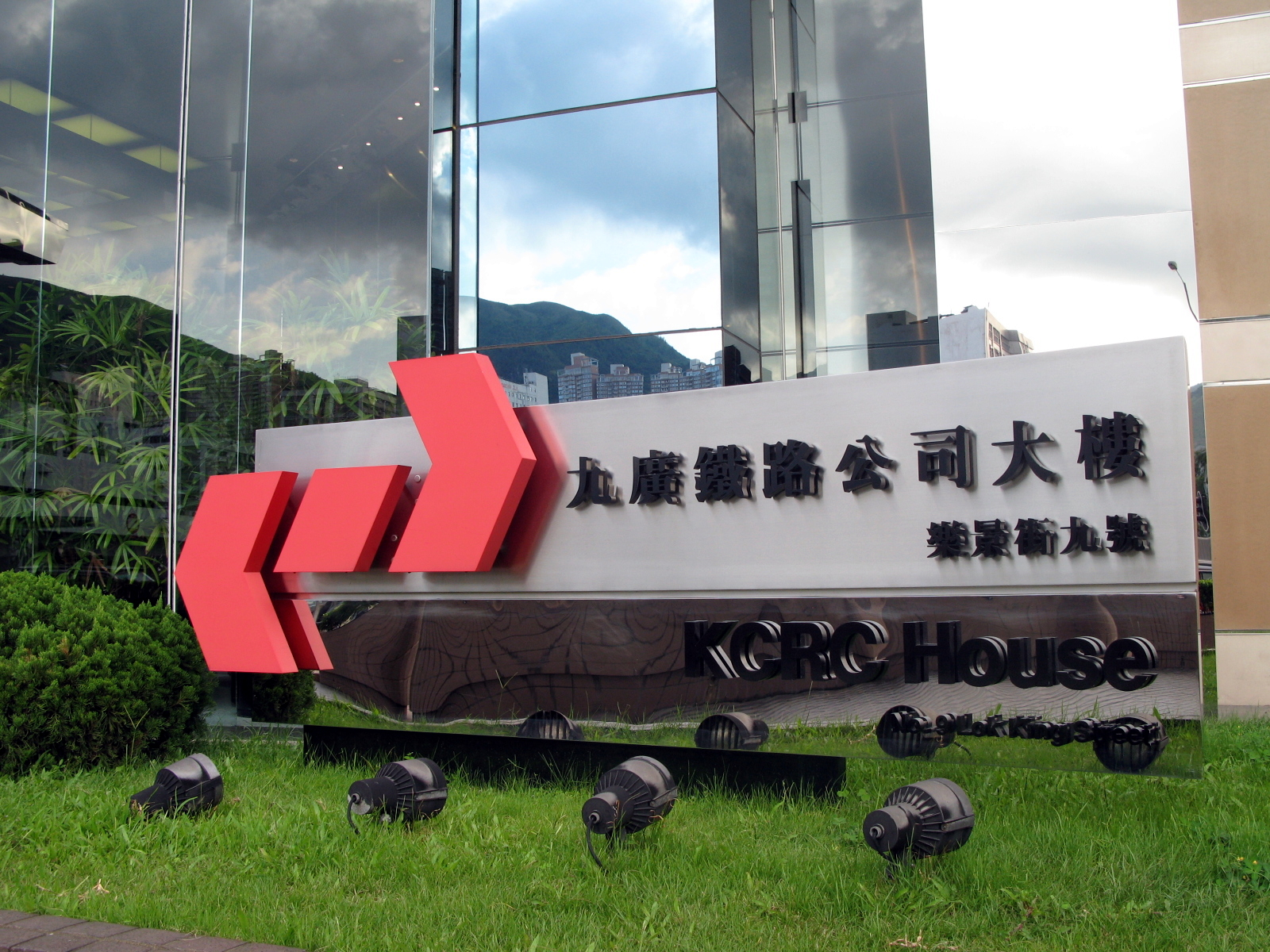 HK KCRC House Ident 火炭鐵路大樓